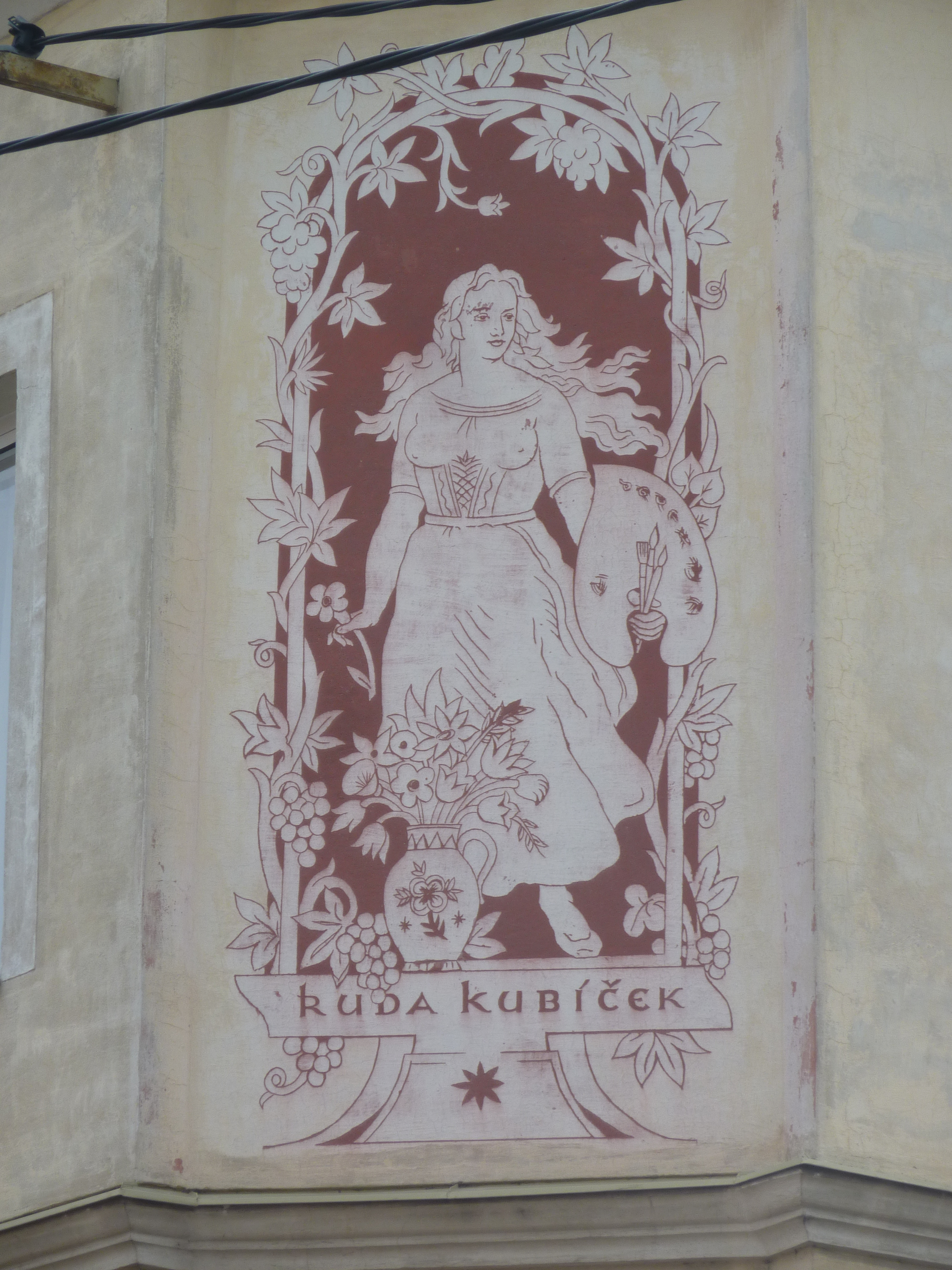 Grafika od akademického malíře Rudy Kubíčka (1891–1983) zdobící rohovou část fasády jeho vlastního domu na Svatoplukově ul. čp. 279 v Uherském Hradišti.